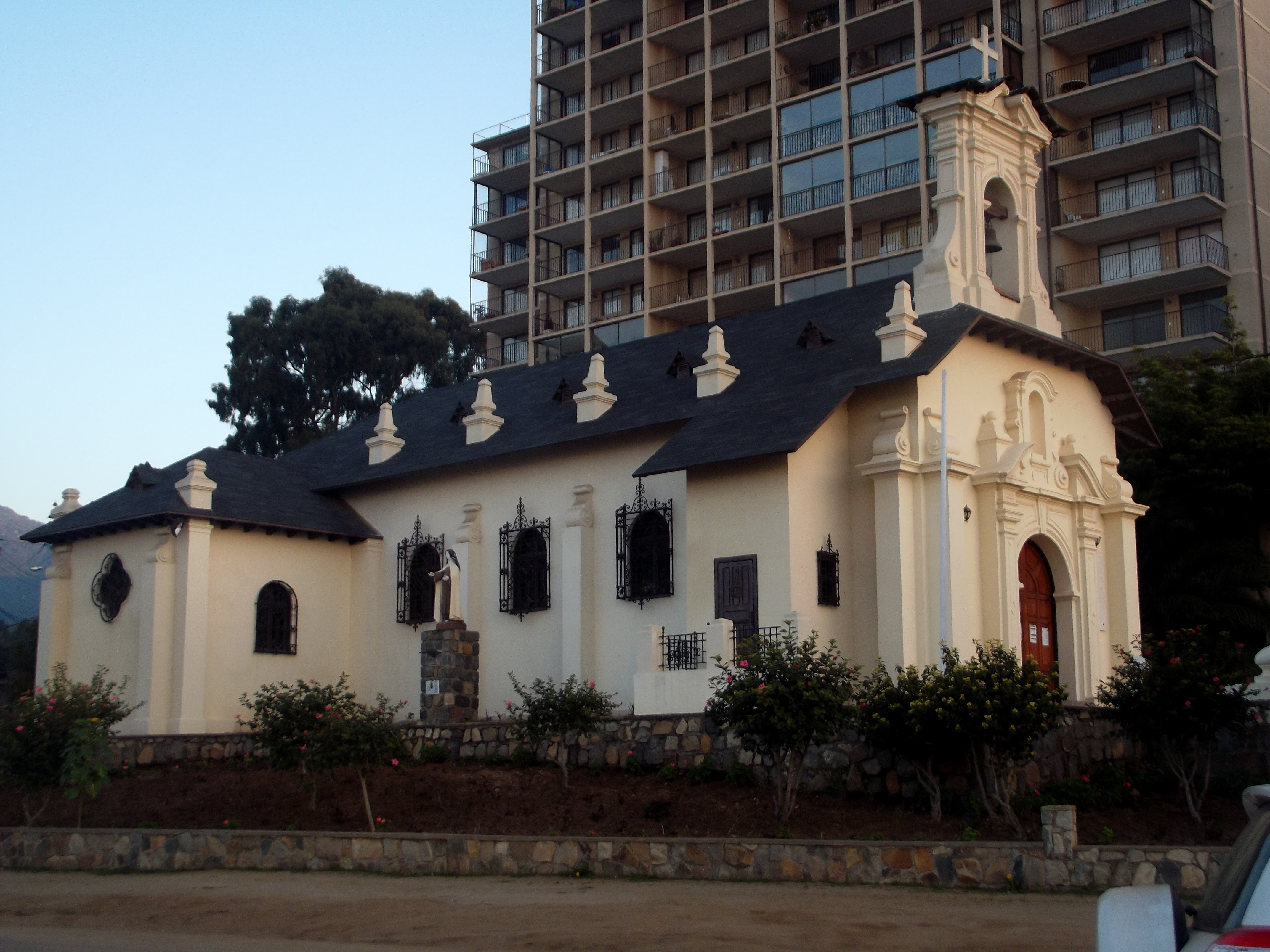 Frente playa Papudo This is a photo of a national monument in Chile: 614